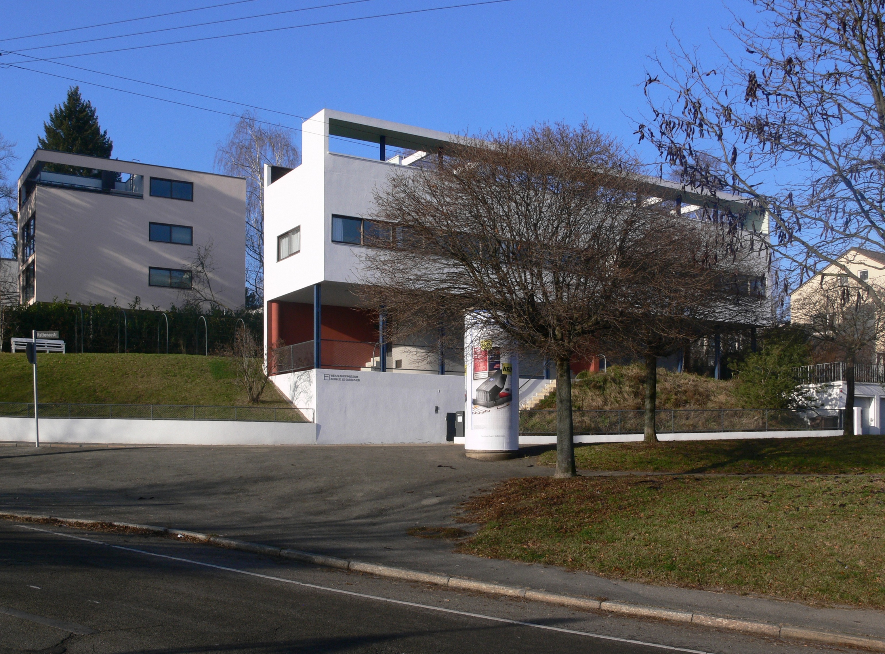 Stuttgart, Weißenhofsiedlung, rechts: Haus Le Corbusier links oben am Bildrand das Haus Citrohan von Le Corbusier und Jeanneret